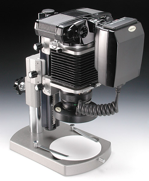 Olympus OM configuration with Macro stand, T-1 flash control and ring flash